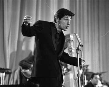 Giorgio Gaber al Festival di Sanremo 1961